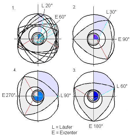 Kolbenbewegung am Wankelmotor